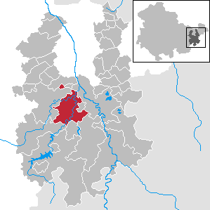 Weida in Thuringia - District Greiz